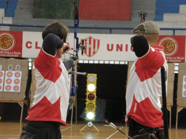 Torneo de Arquería en Club Atlético Unión de Santa Fe